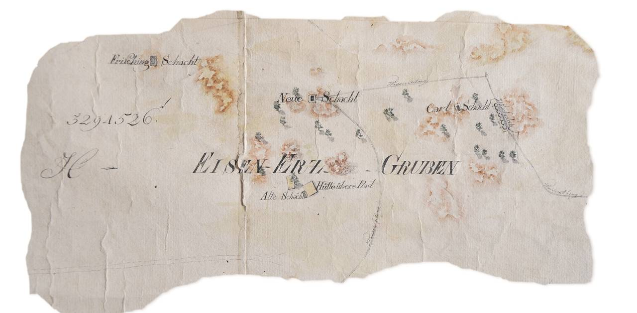 Karte aus dem Jahre 1795 über das Küttiger Eisenbergwerk, im Besitz der Gemeinde Erlinsbach.